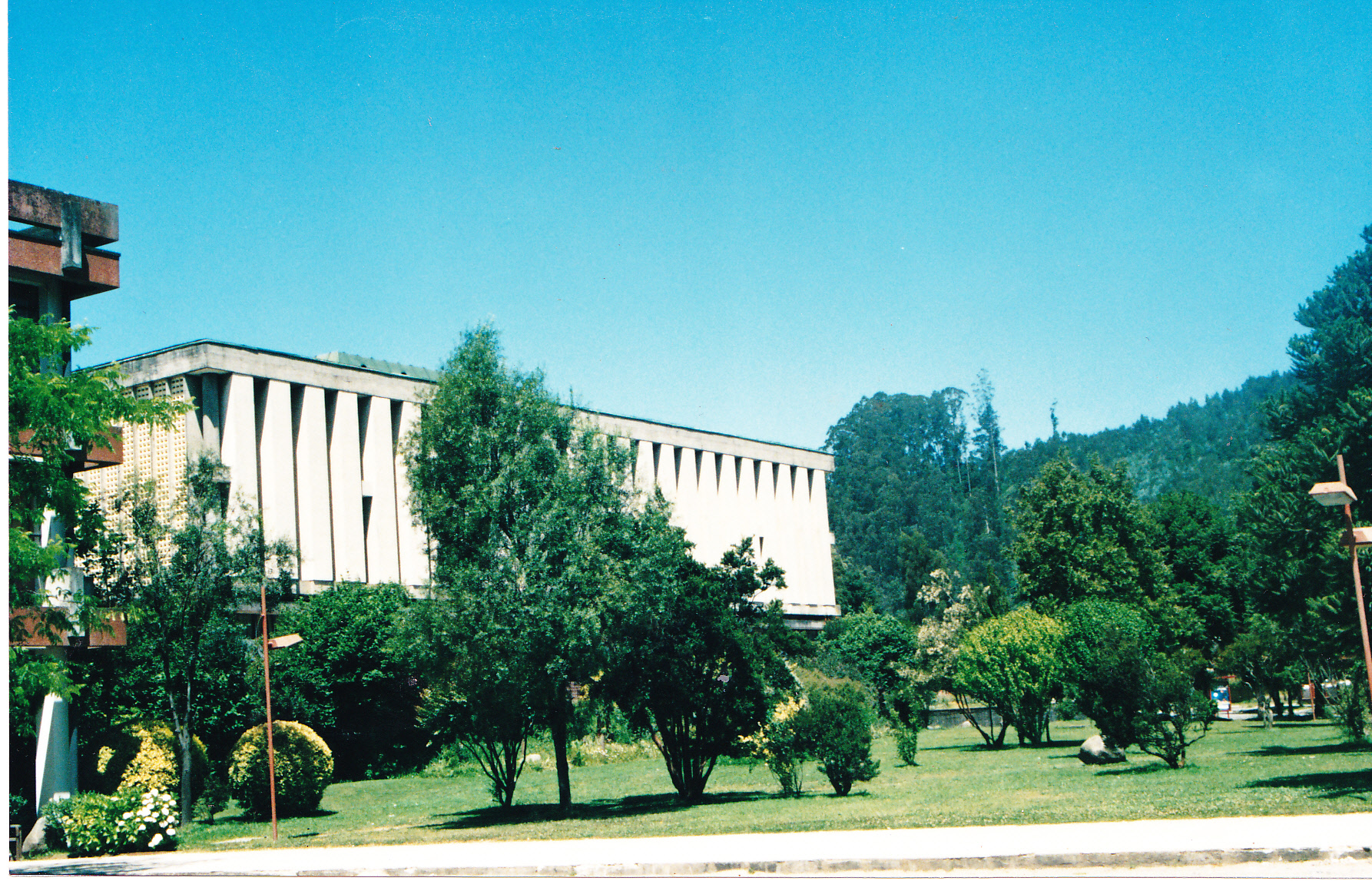 Fotografía de Jardines ubicados detrás de la Biblioteca Central de la Universidad de Concepción